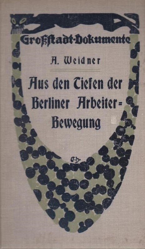 Albert Weidner: Aus den Tiefen der Berliner Arbeiterbewegung. Berlin: Hermann Seemann Nachfolger, 2. Auflage, 1905 Großstadt-Dokumente Band 9, hrsg. von Hans Ostwald